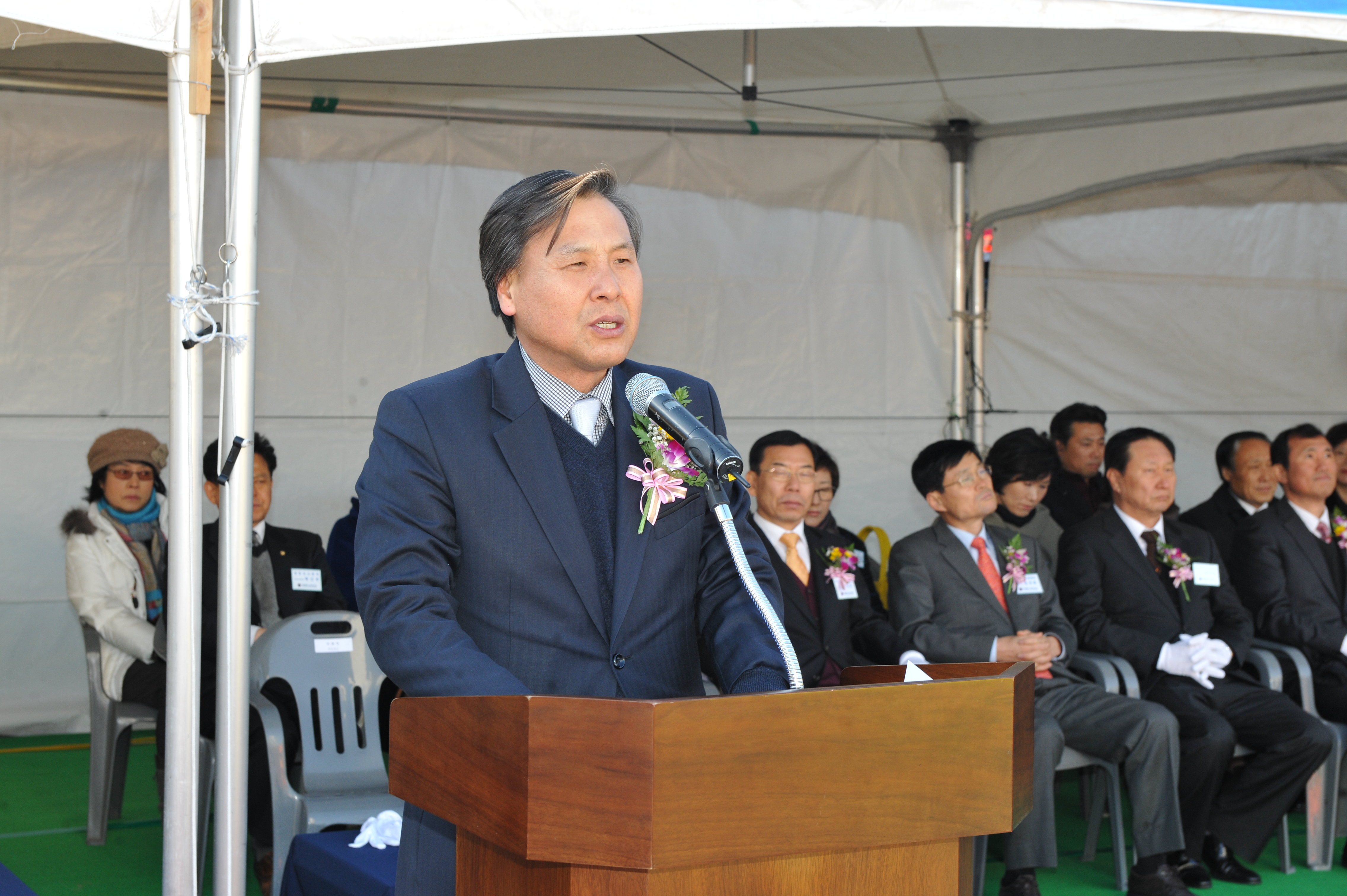 유광상